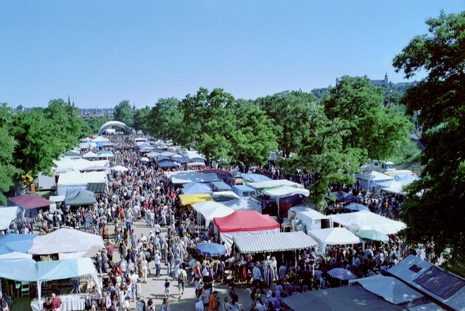 Africa-Festival 2002 Kamera: Minolta Dynax 505 Si Super (Sigma 28-300)